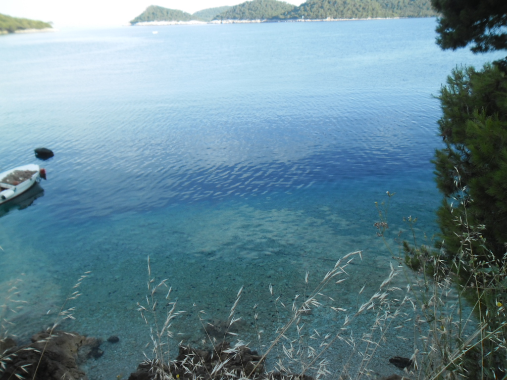 otok Lastovo